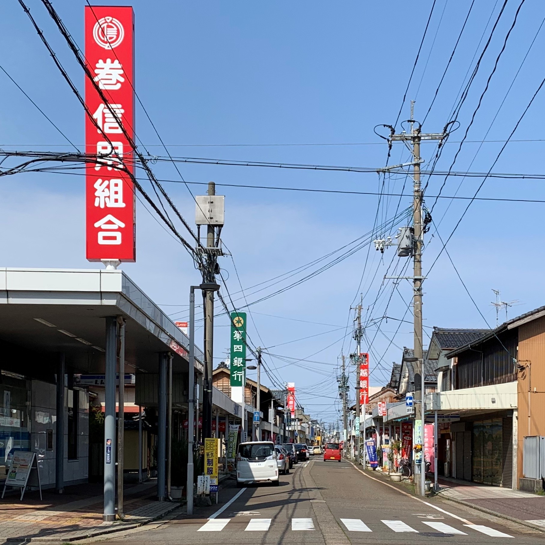 巻（新潟市西蒲区）中心部（2020年3月）新潟県道374号五千石巻新潟線